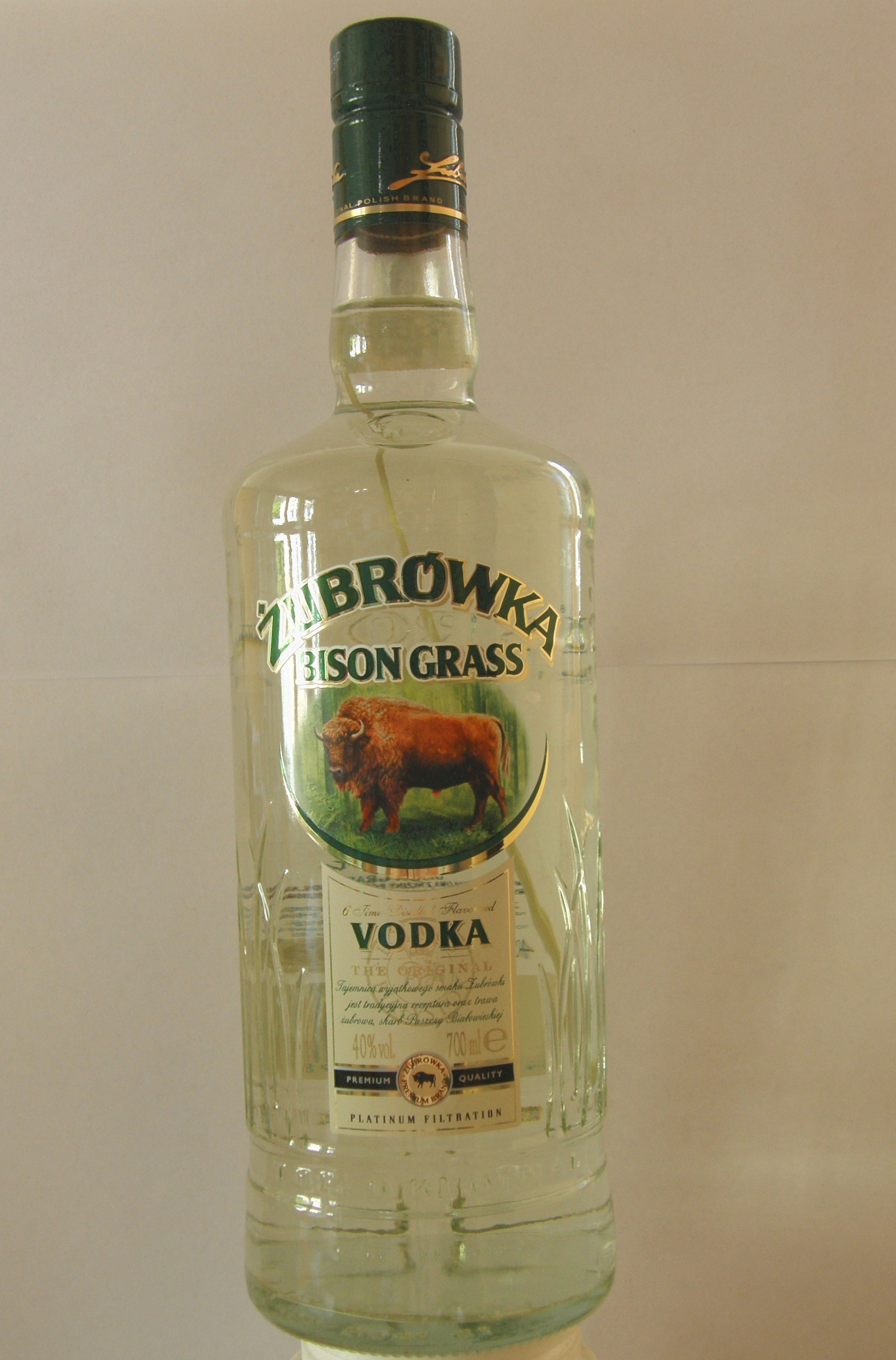 Bouteille de 70 cl de Żubrówka Bison Grass